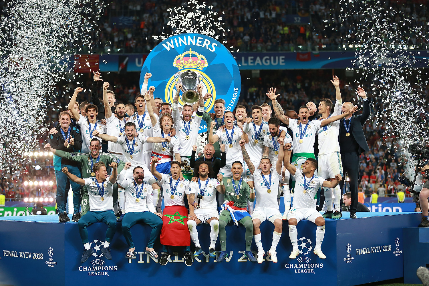 Финал ЛЧ в Киеве: 13-й кубок «Реала» и слёзы «Ливерпуля»